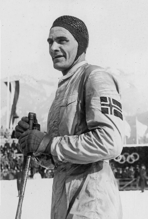 Oddbjorn Hagen aux JO 1936